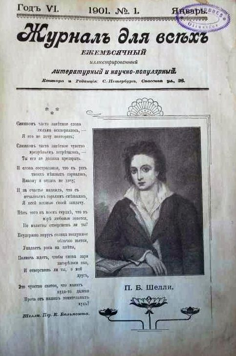 Ежемесячный иллюстрированный литературный и научно-популярный журнал "Журнал для всех". № 1. 1901 год.